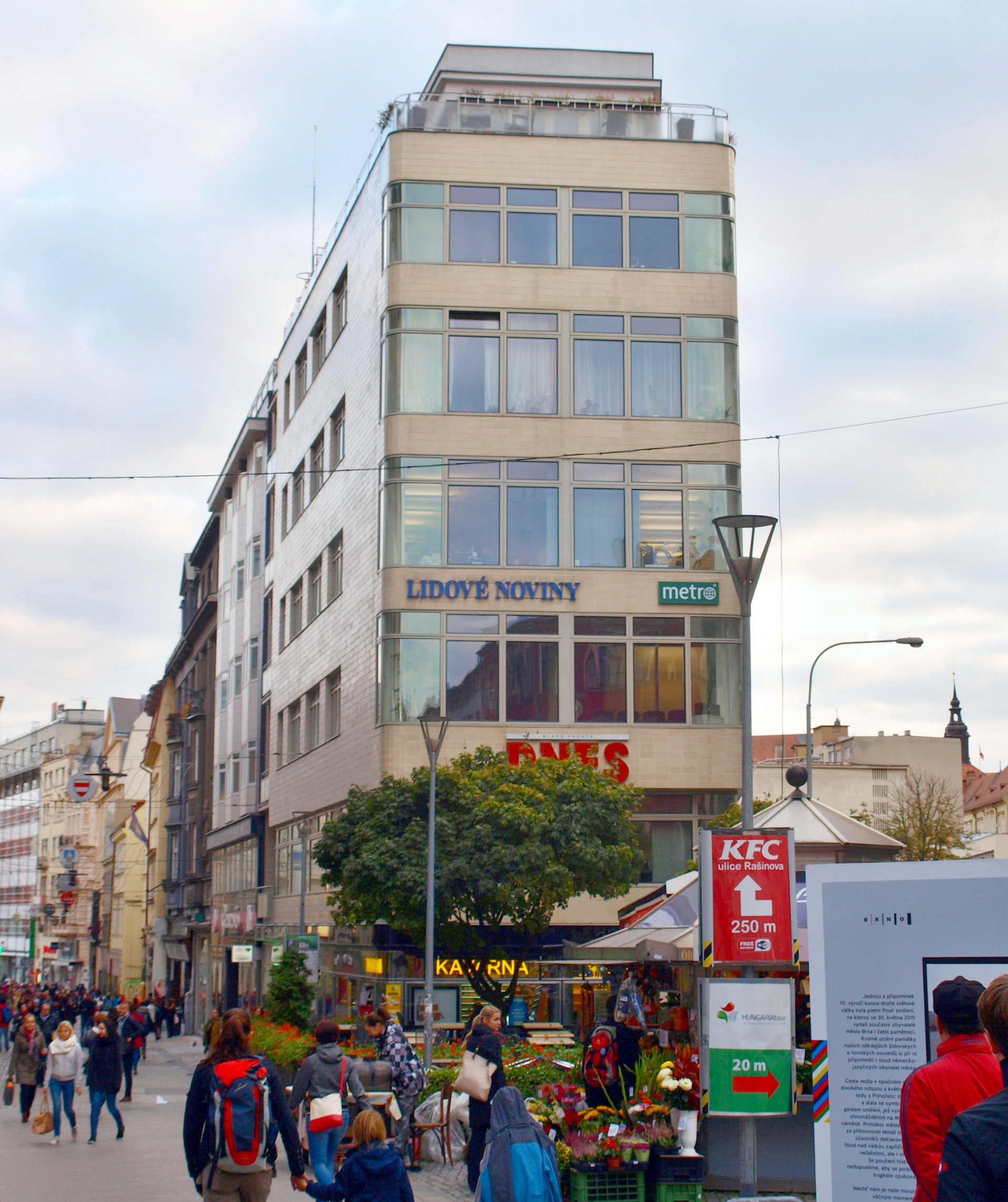 Budova brněnské redakce MF Dnes